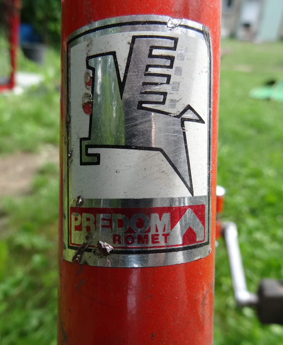 Logo Zakładów Rowerowych "Predom-Romet" - naklejka na rowerze Romet z lat 80. XX w.